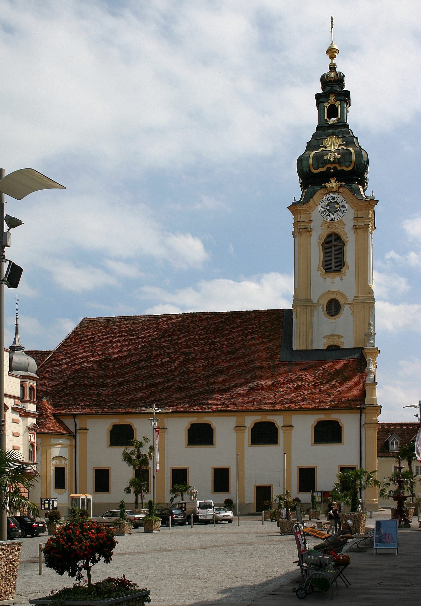 Hartberg römisch-katholische Pfarrkirche „Sankt Martin“